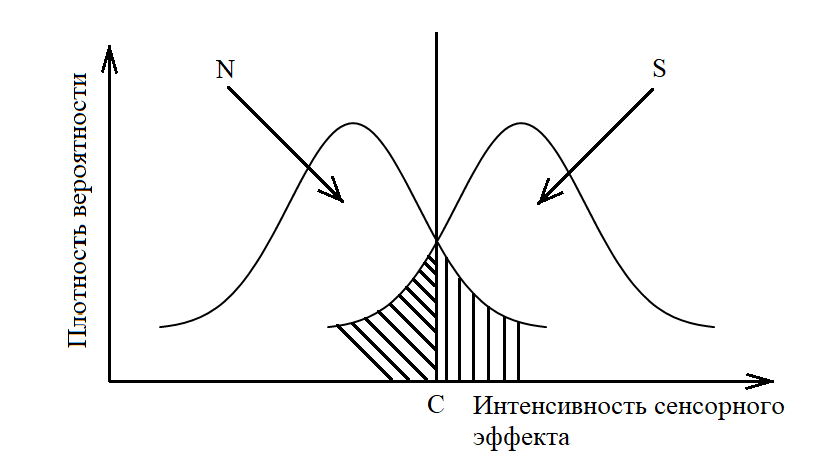 Метод ТОС. Модель обнаружения сигнала для симметричного критерия/